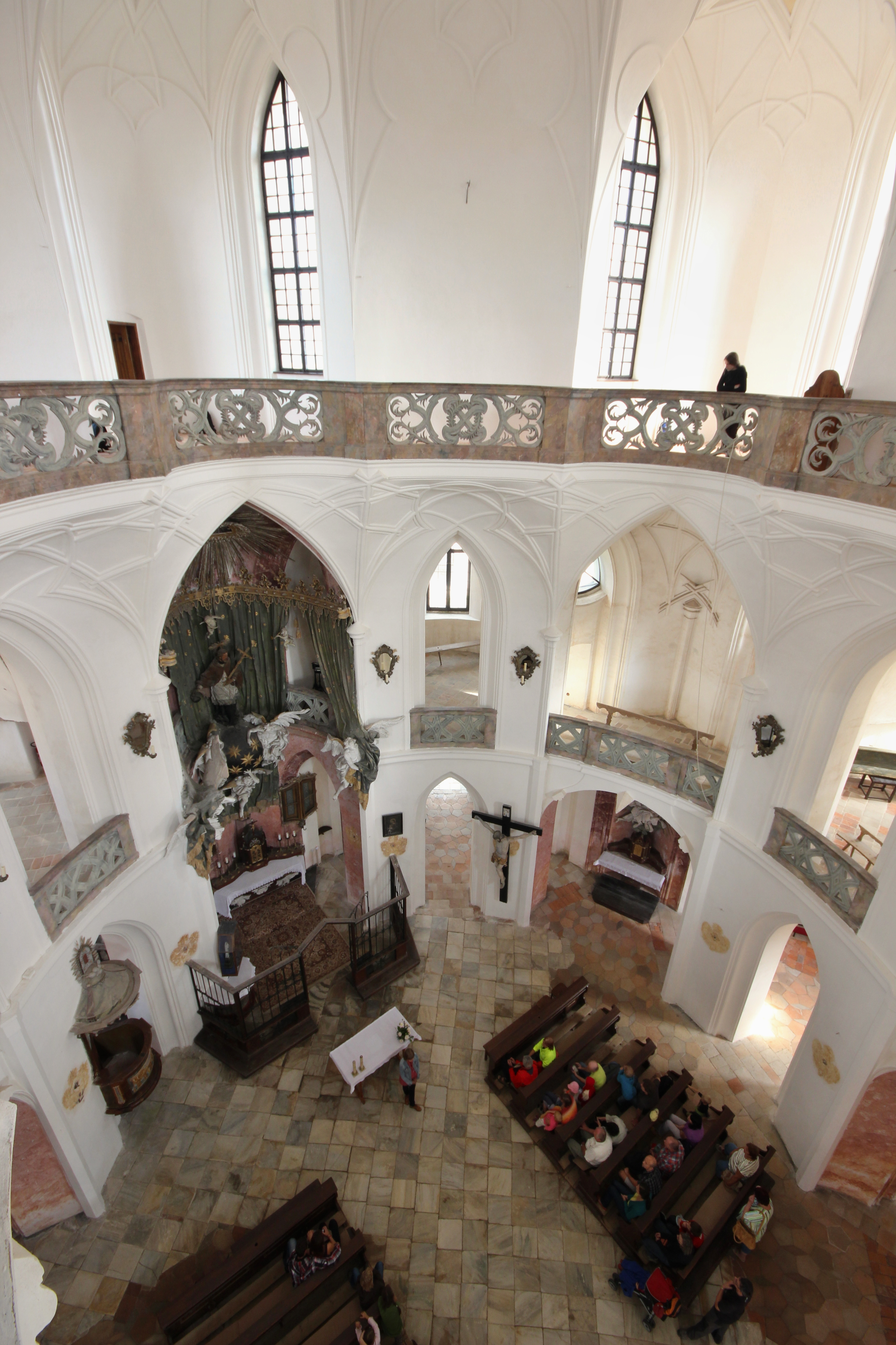 Poutní kostel sv. Jana Nepomuckého na Zelené hoře.